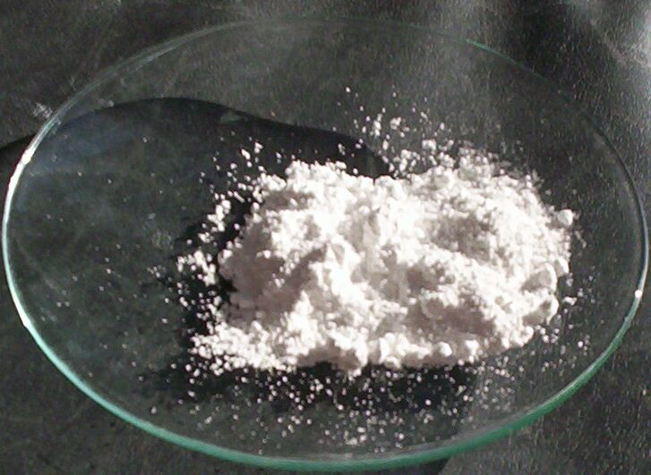 titanium(IV) oxide